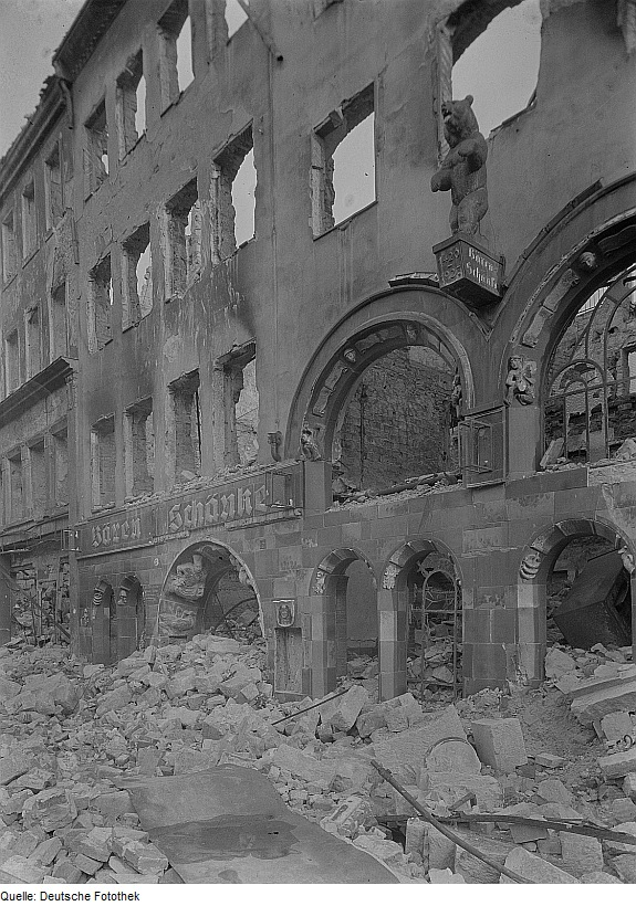 Original image description from the Deutsche Fotothek Ruine der Bärenschänke, Portalgewände mit Koch undKellnerin